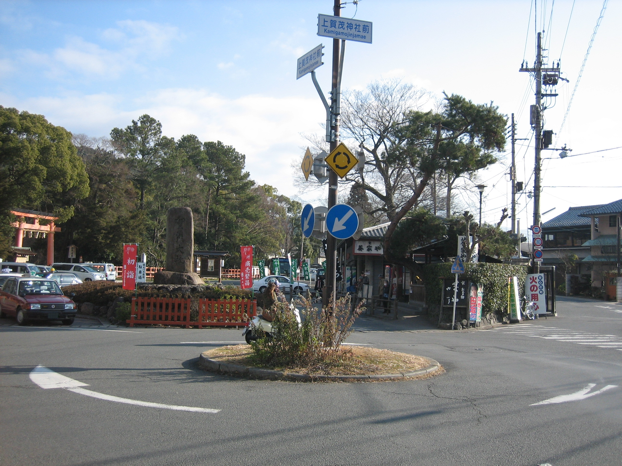 上賀茂神社前ロータリーを上賀茂本山から撮影